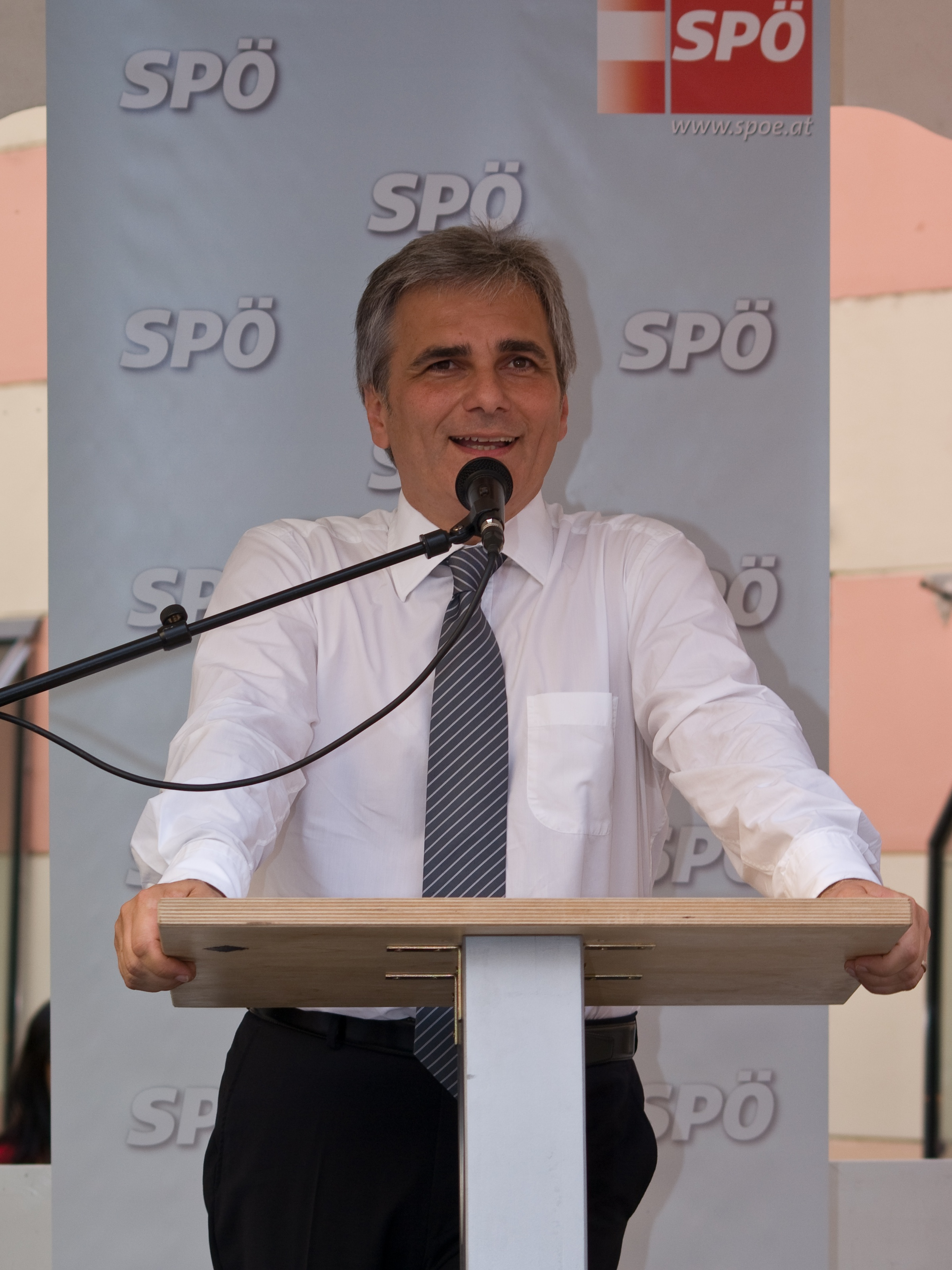 Der österreichische Politiker Werner Faymann bei einer Wahlkampfveranstaltung der SPÖ am 5. September 2008 in Krems.